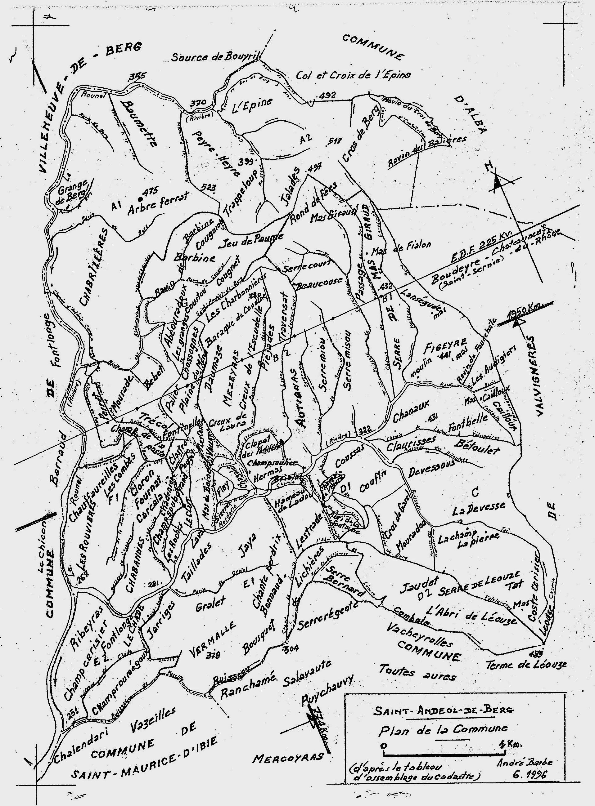 Lieux-dits à Saint-Andéol-de-Berg Ardèche version 2